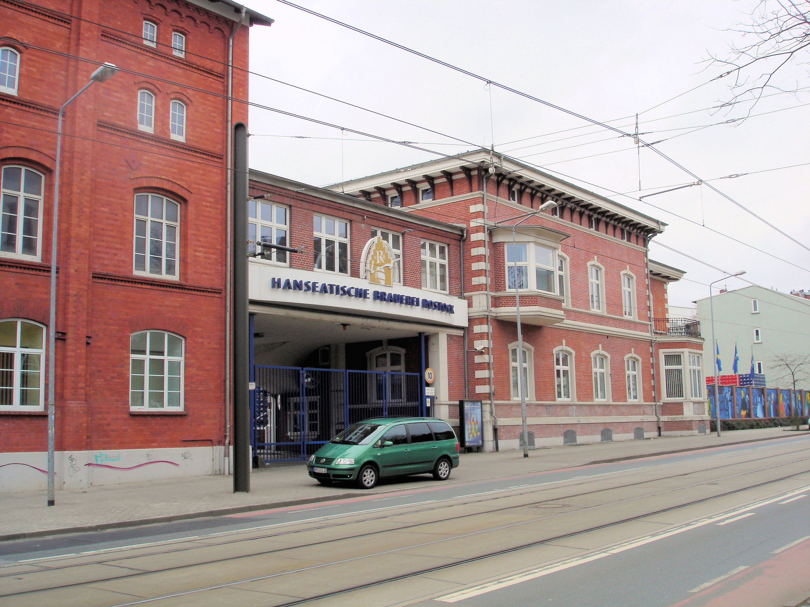 Hanseatische Brauerei Rostock, Mecklenburg-Vorpommern